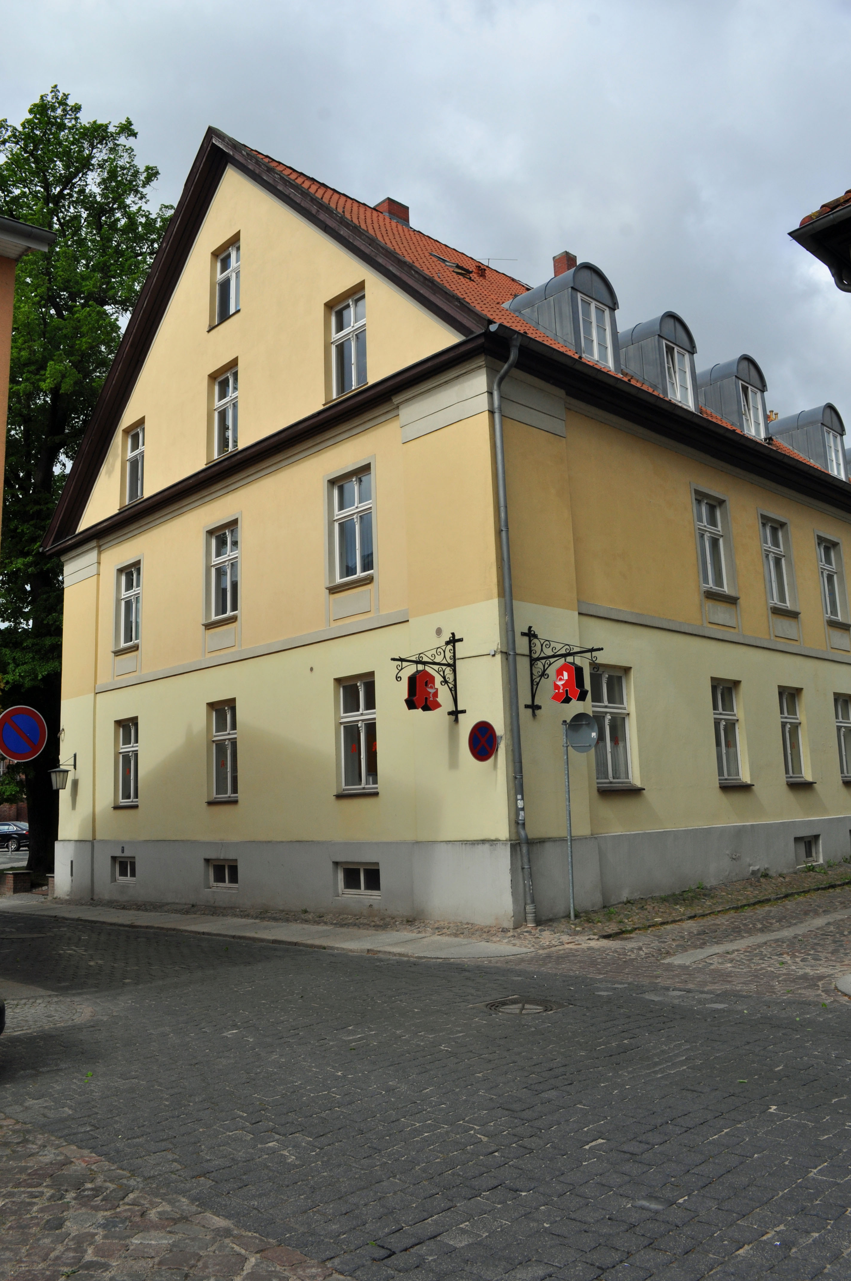 Gebäude in Stralsund, siehe Dateiname